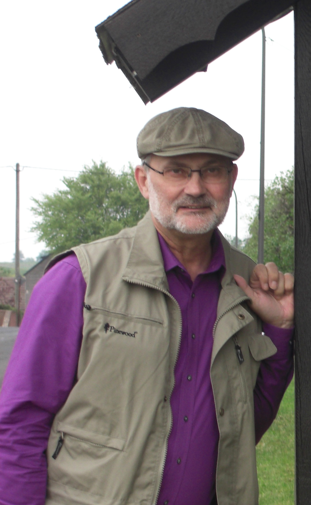 Der Publizist Klaus Waller